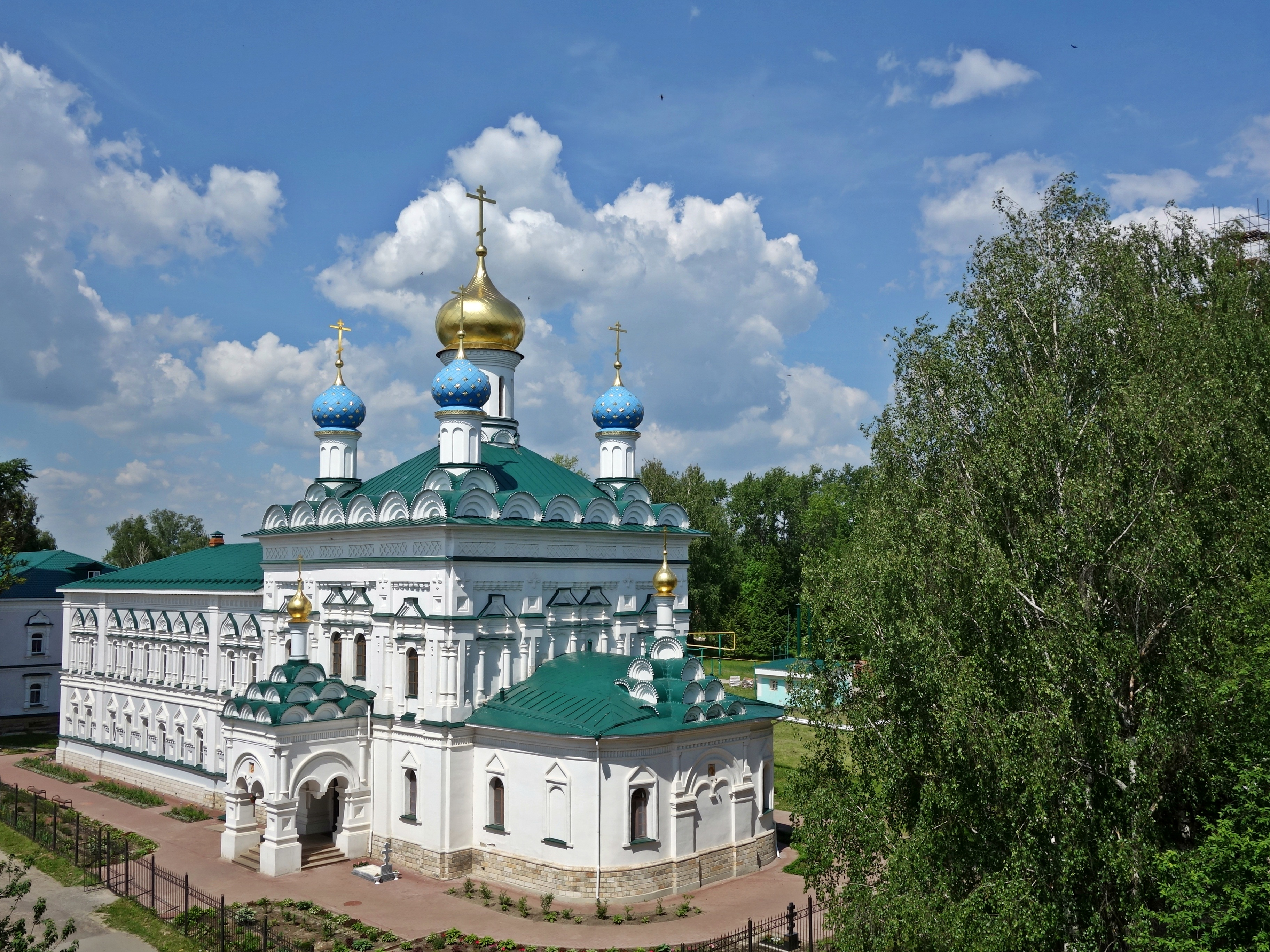 Выкса, Успенская церковь